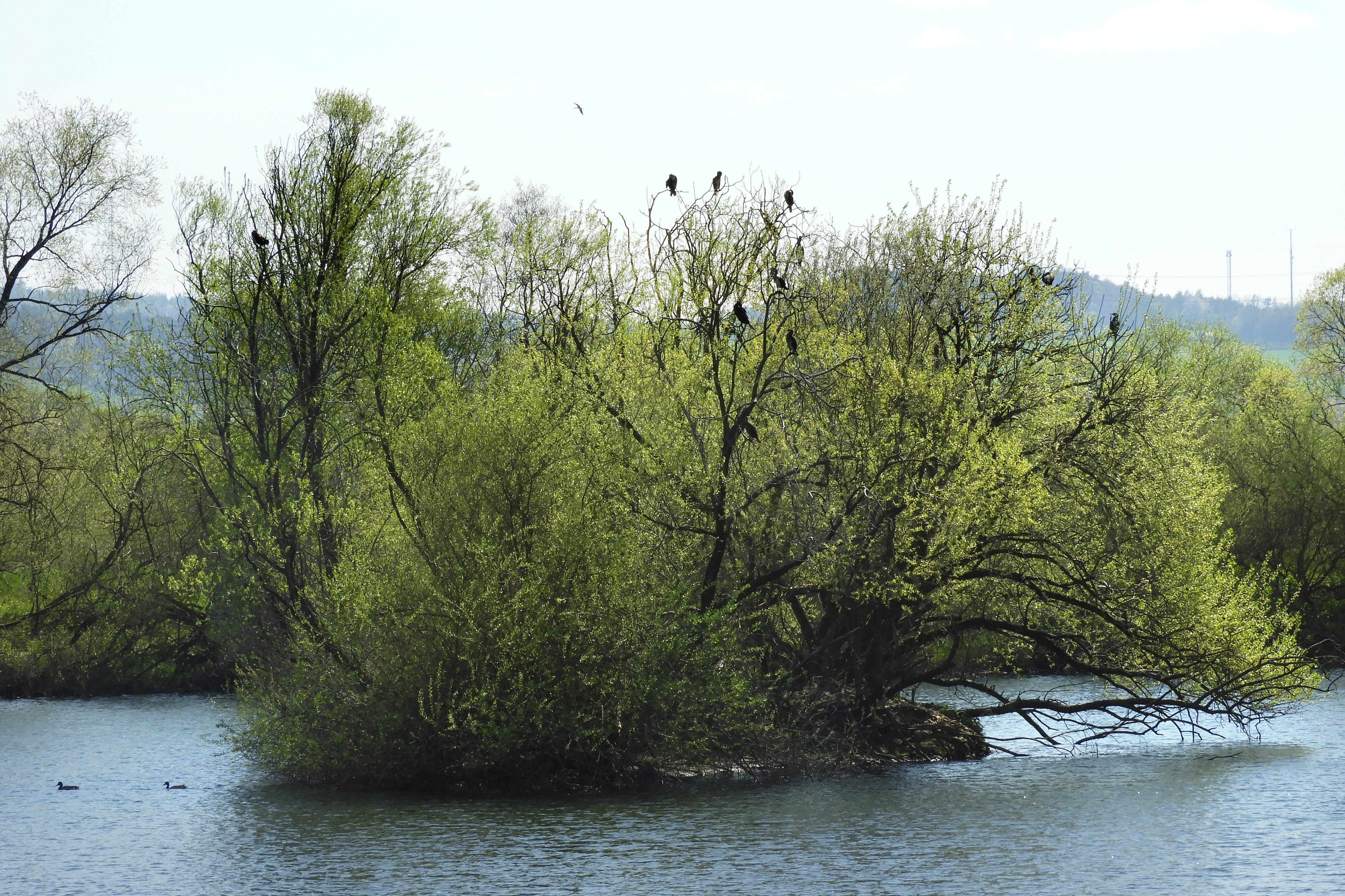 Der im September 1983 zum Naturschutzgebiet erklärte ehemalige Kiesteich liegt im Mittleren Fuldatal, südlich des Bebraer Stadtteils Blankenheim im Landkreis Hersfeld-Rotenburg. Das Schutzgebiet befindet sich in einem Dreiecksbereich, der nordwestlich von der Bahnstrecke von Bebra nach Fulda und südlich vom linken Ufer der Fulda begrenzt wird. Zweck der Unterschutzstellung war es, das aus ornithologischer Sicht wertvolle Gewässer als Lebensraum zahlreicher im Bestand bedrohter Vogelarten dauerhaft zu sichern und durch Gestaltungsmaßnahmen in seiner besonderen Bedeutung für die Vogelwelt zu verbessern. This is a picture of the protected area listed at WDPA under the ID 81989